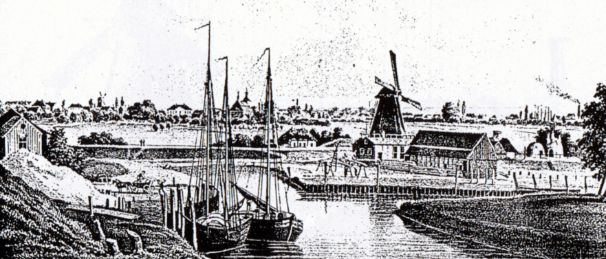 Die ehemalige Sägemühe in Uetersen am Klosterdeich